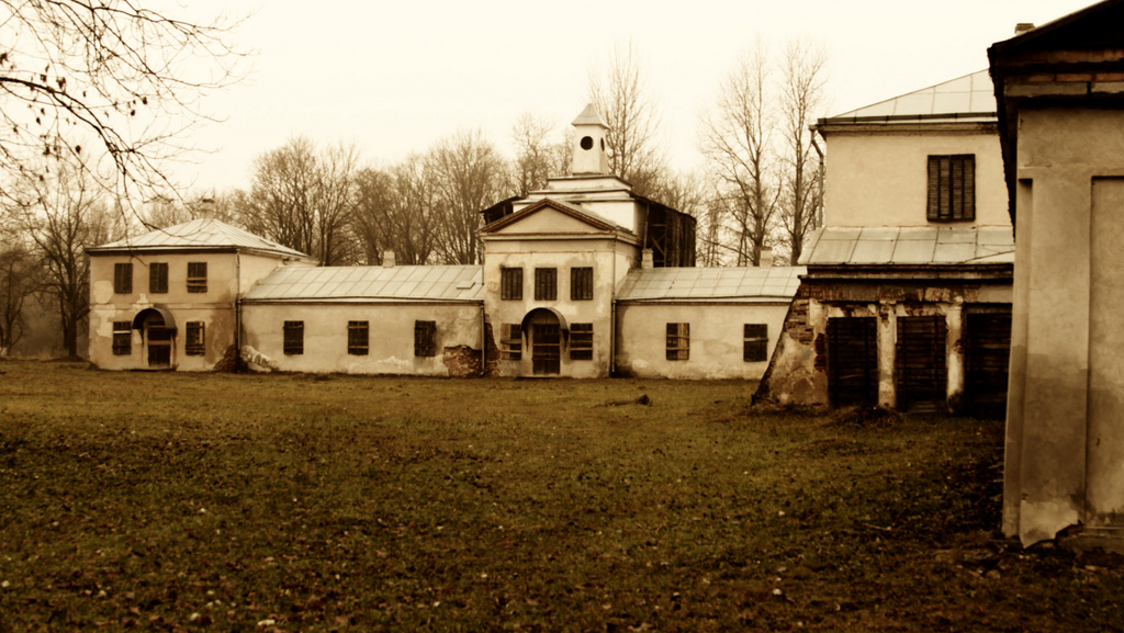 Беларуская (тарашкевіца): Ансамбль былога палацу Агінскіх у Залесьсі. This is a photo of Belarusian heritage monument. Reference number: 412Г000598 ( WLM)